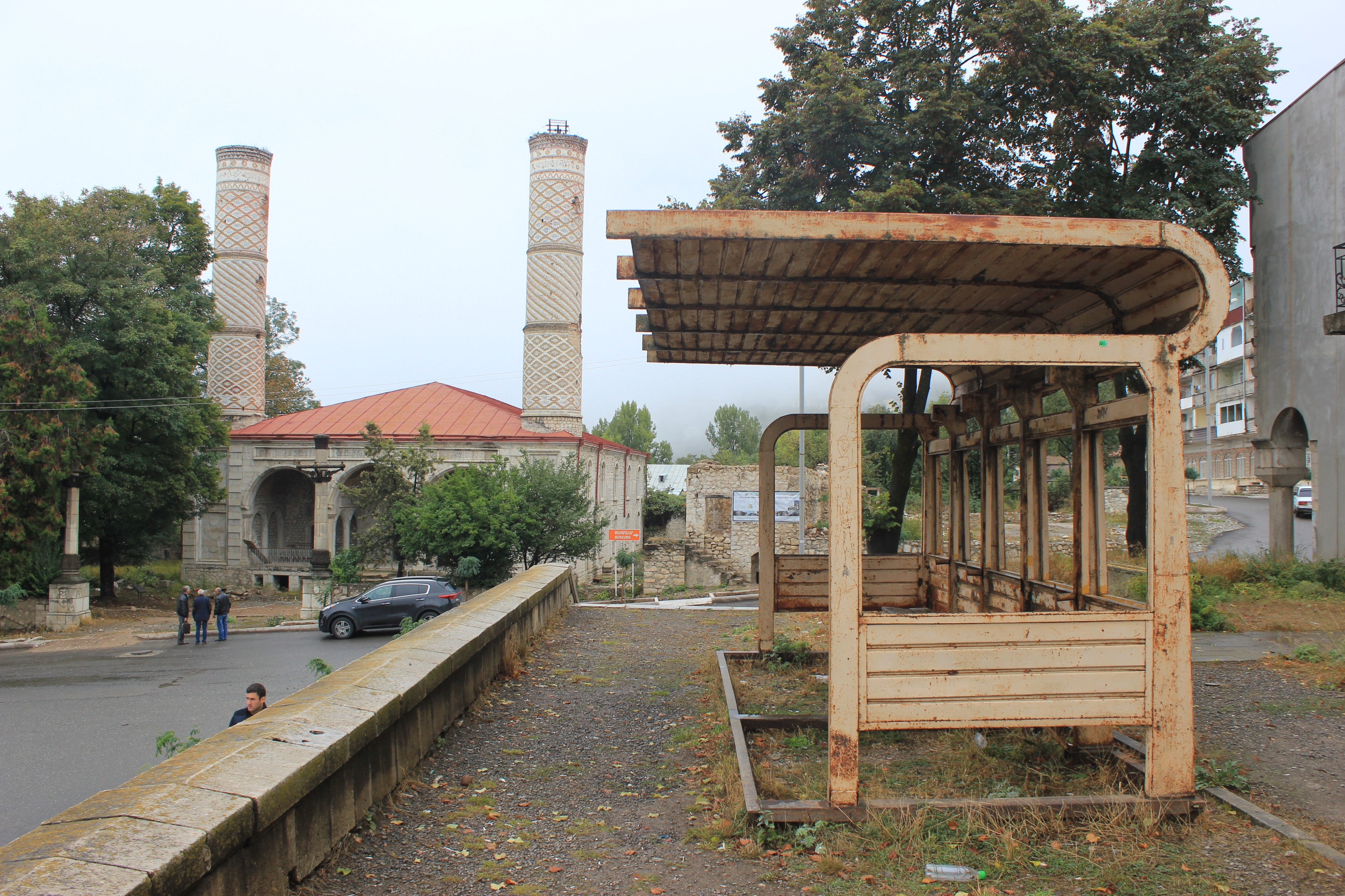 Bushaltestelle an der Oberen Moschee in Schuscha, Bergkarabach.